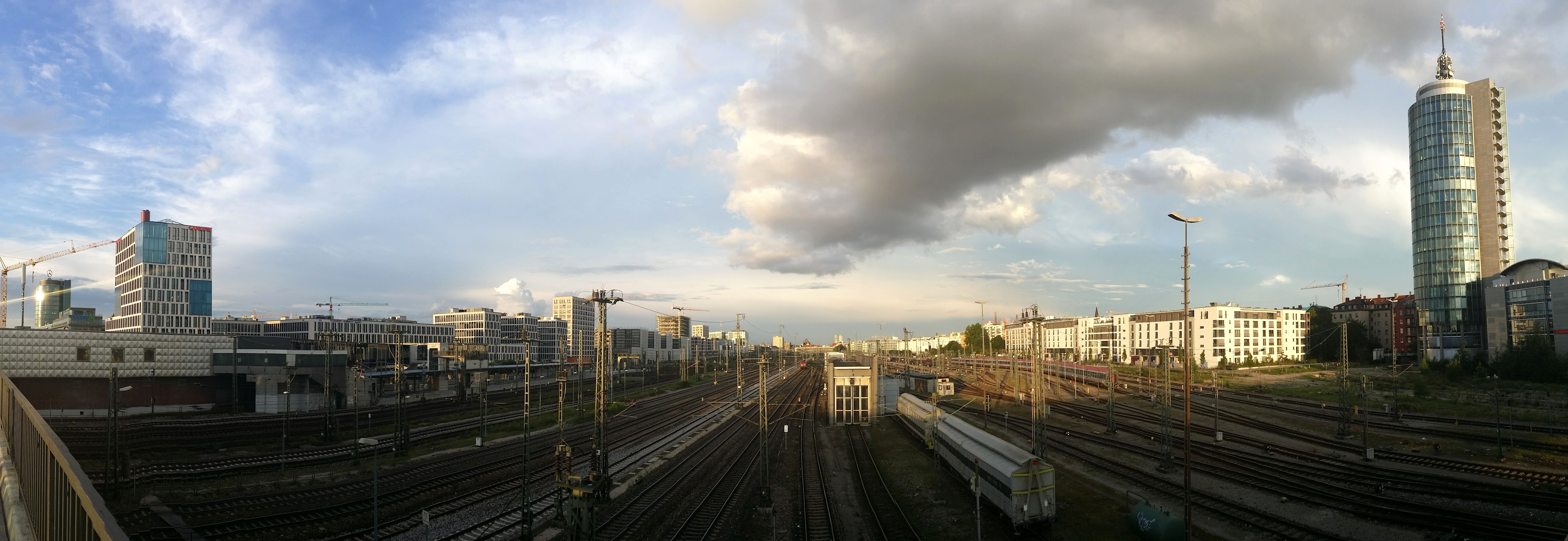 Deutschland, Bayern, München, Donnersberger Brücke, Blick vom Bauwerk in Richtung Hauptbahnhof (Osten), rechts im Bild der Central Tower München